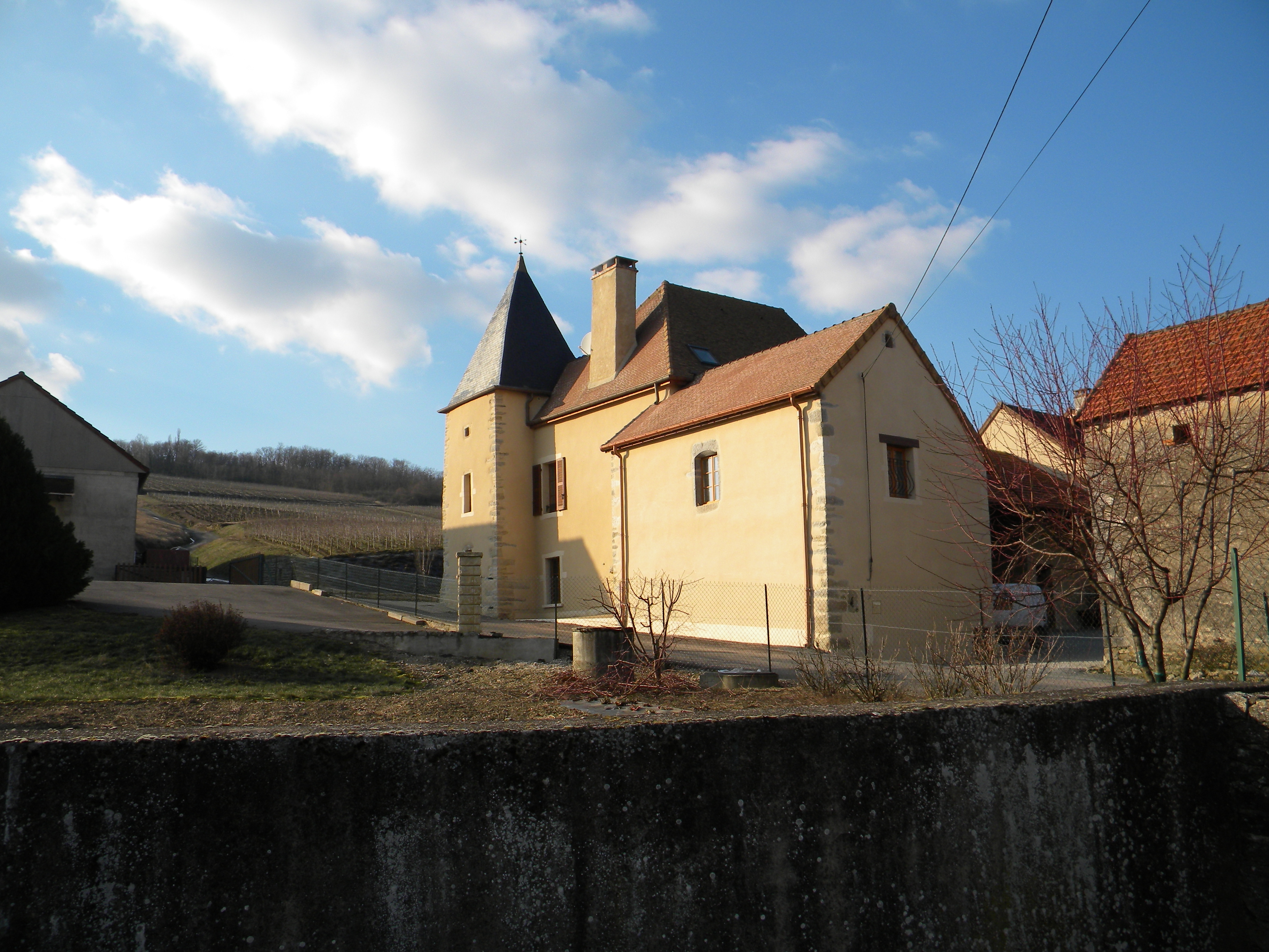 Change (Saône-et-Loire, France). Hameau de Marcheseuil, maison ancienne rue de Rème. Au fond à gauche la montagne de Rème.